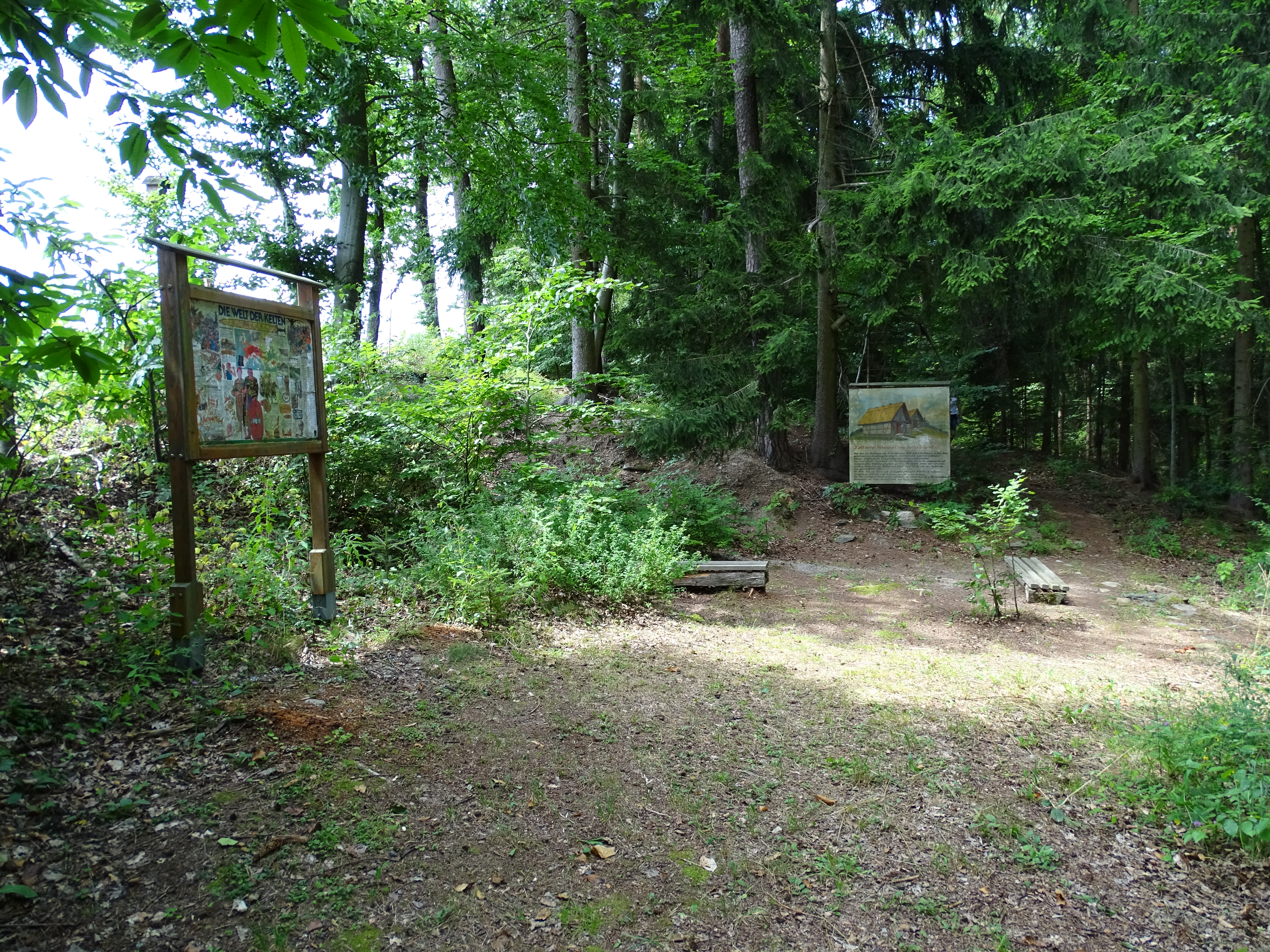 Infotafeln am Standort der urgeschichtlichen Höhensiedlung am Dietenberg. Am Boden sind die Fundamente eines Keltenhauses erkennbar.